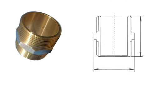 Ниппель - соеденительный фитинг трубопровода.